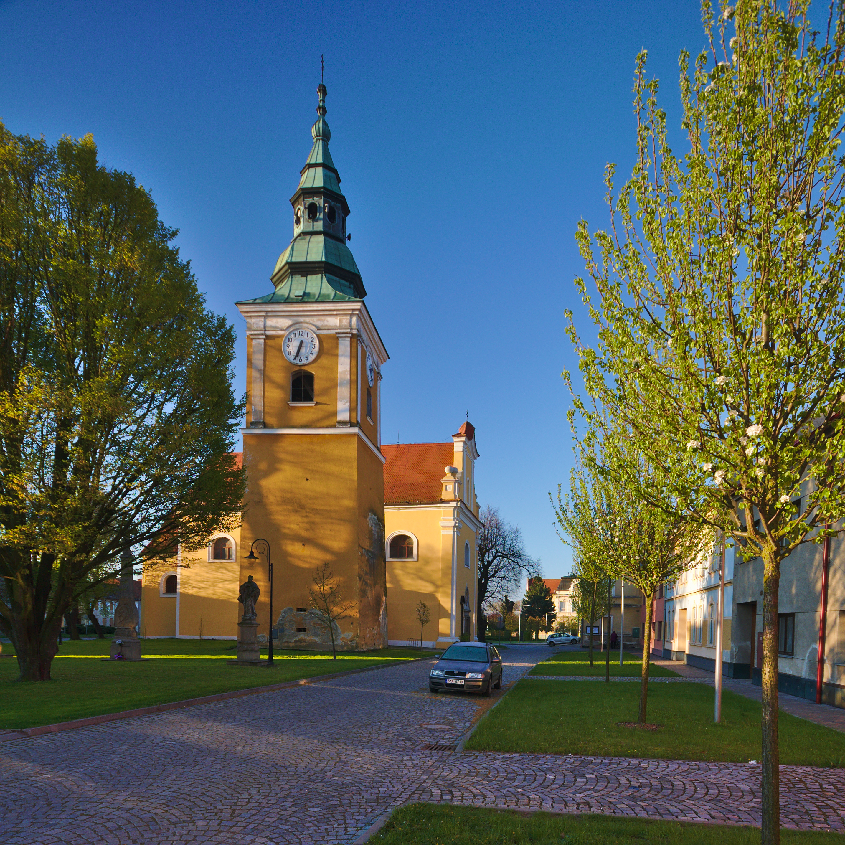 Kostel svaté Máří Magdalény, Němčice nad Hanou, okres Prostějov